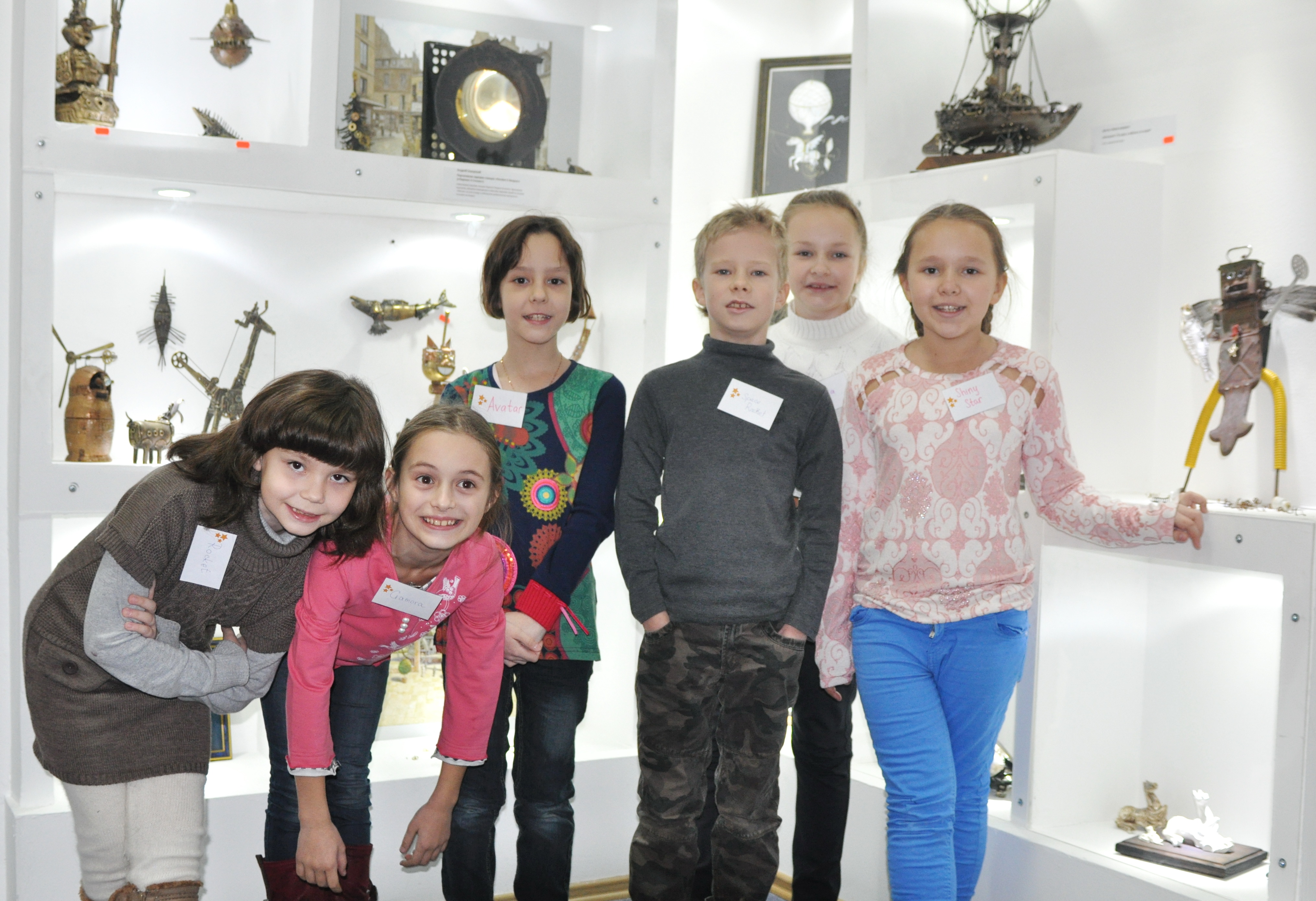 Галерея РациоАрт Петербургского Планетария